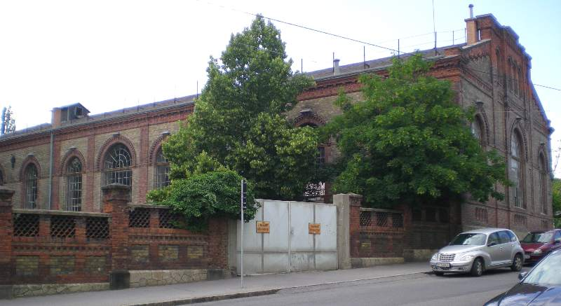 Das ehemalige Pumpwerk Breitensee der Wiener Wasserwerke in Wien-Penzing (Hütteldorfer Straße 142)